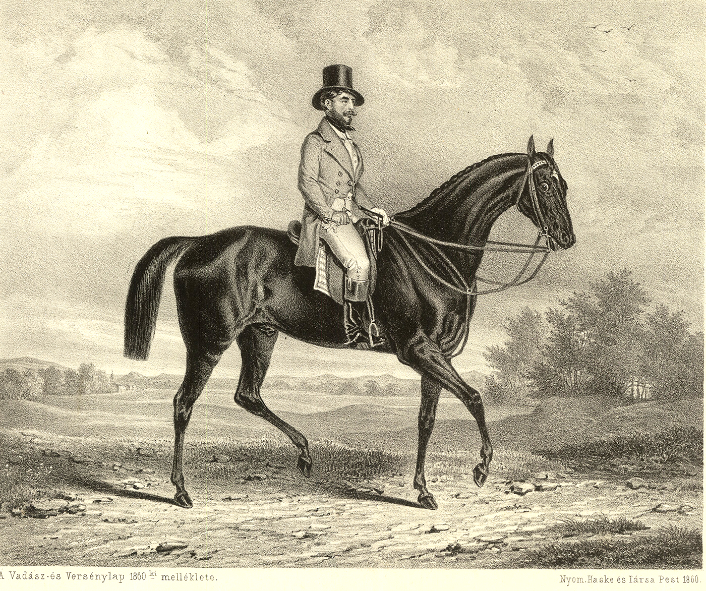 Szlavniczai és bajnai gróf Sándor Móric az Ördöglovas (Buda, 1805. május 23. – Bécs, 1878. február 23.) magyar főúr, európai hírű lovas, úszó és vadász.